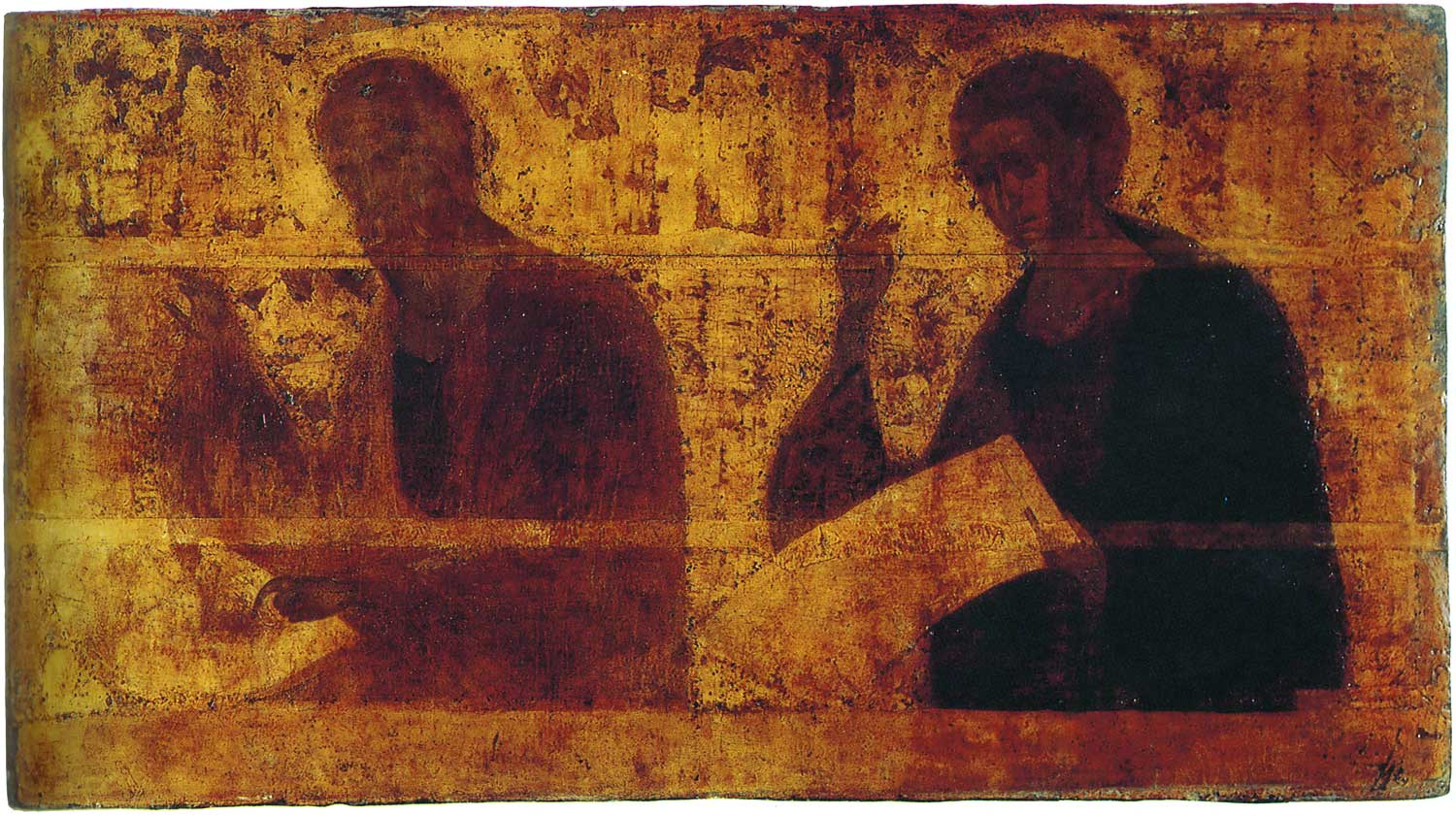 Пророческий ряд. Троицкий собор Свято-Троицкой Сергиевой Лавры, Сергиев Посад, Россия